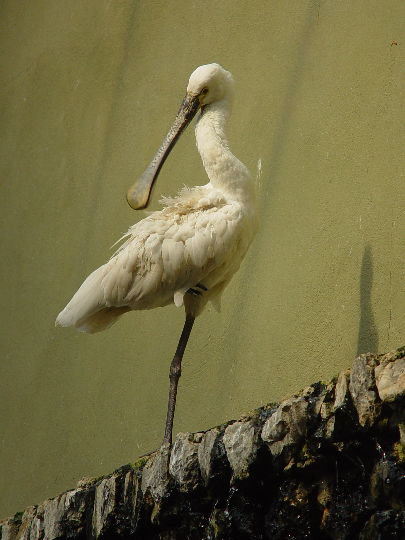 Bogazici Zoo